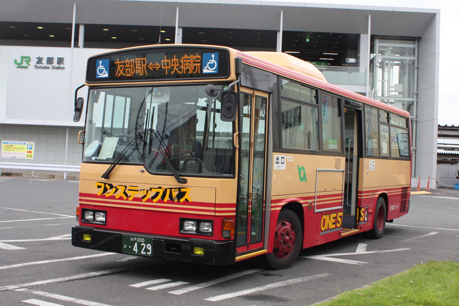 茨城オート 車番:429 友部駅南口にて